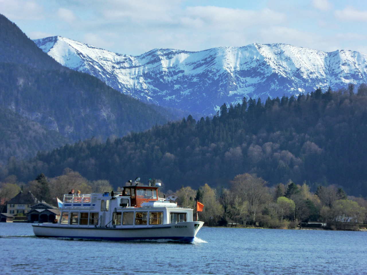 Blauberge mit Halserspitz vom Tegernsee